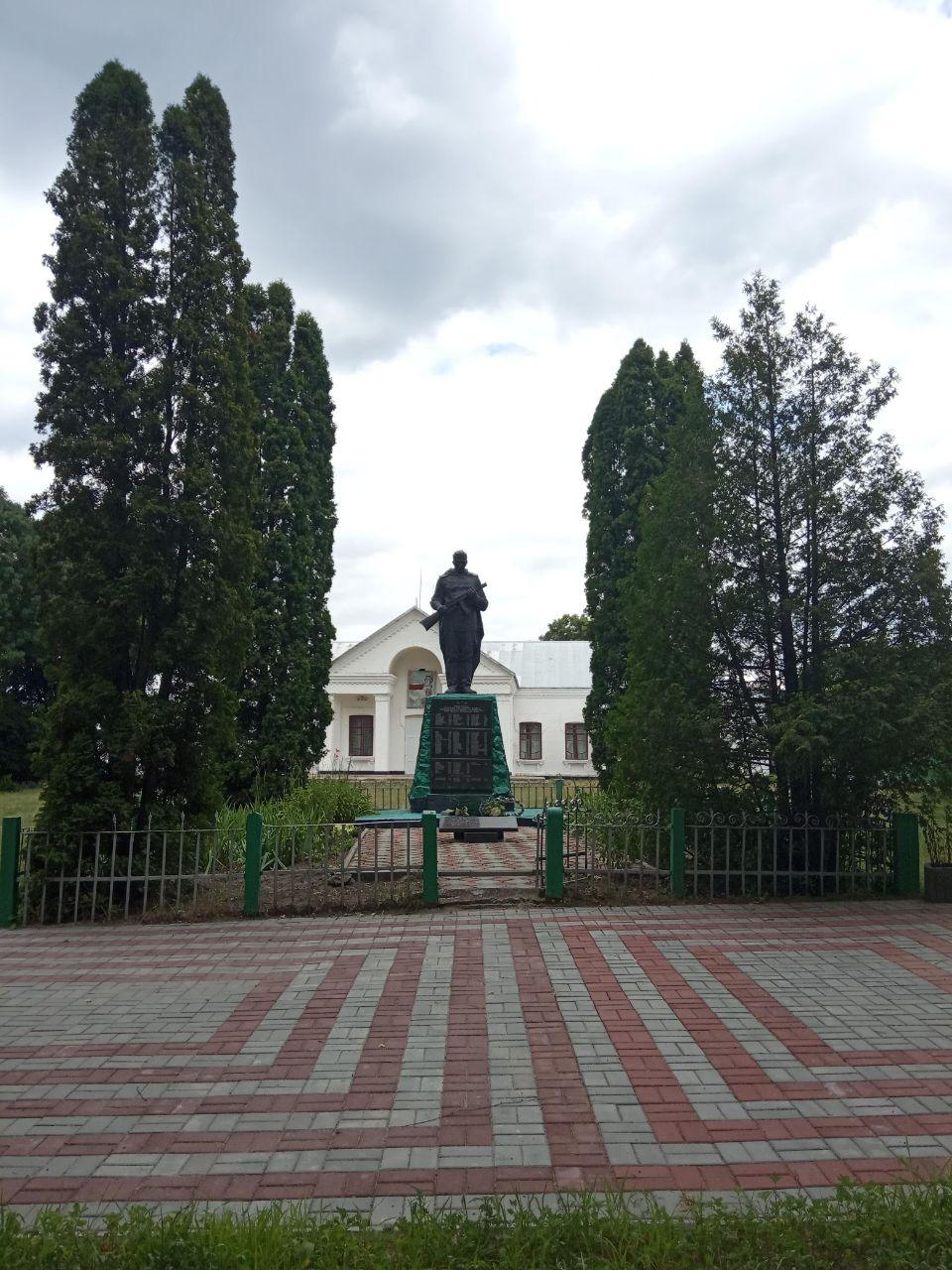 Пам'ятник-монумент в честь героїв села